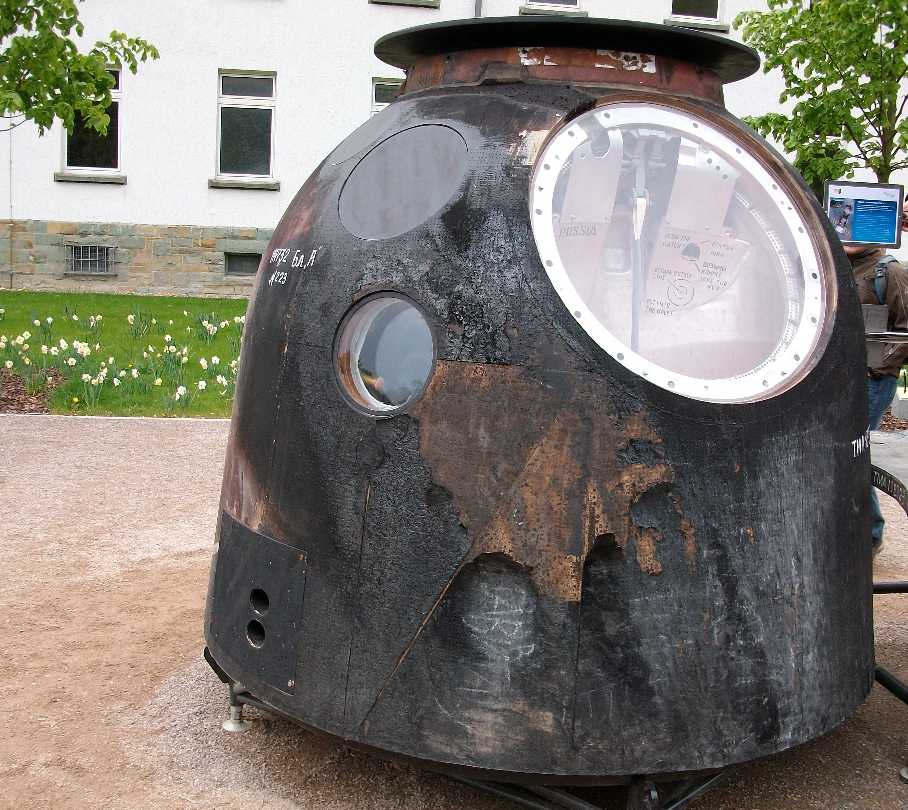 Sojus Landemodul TMA-13 auf der Landesgartenschau Hemer 2010 in Hemer, (Germany)